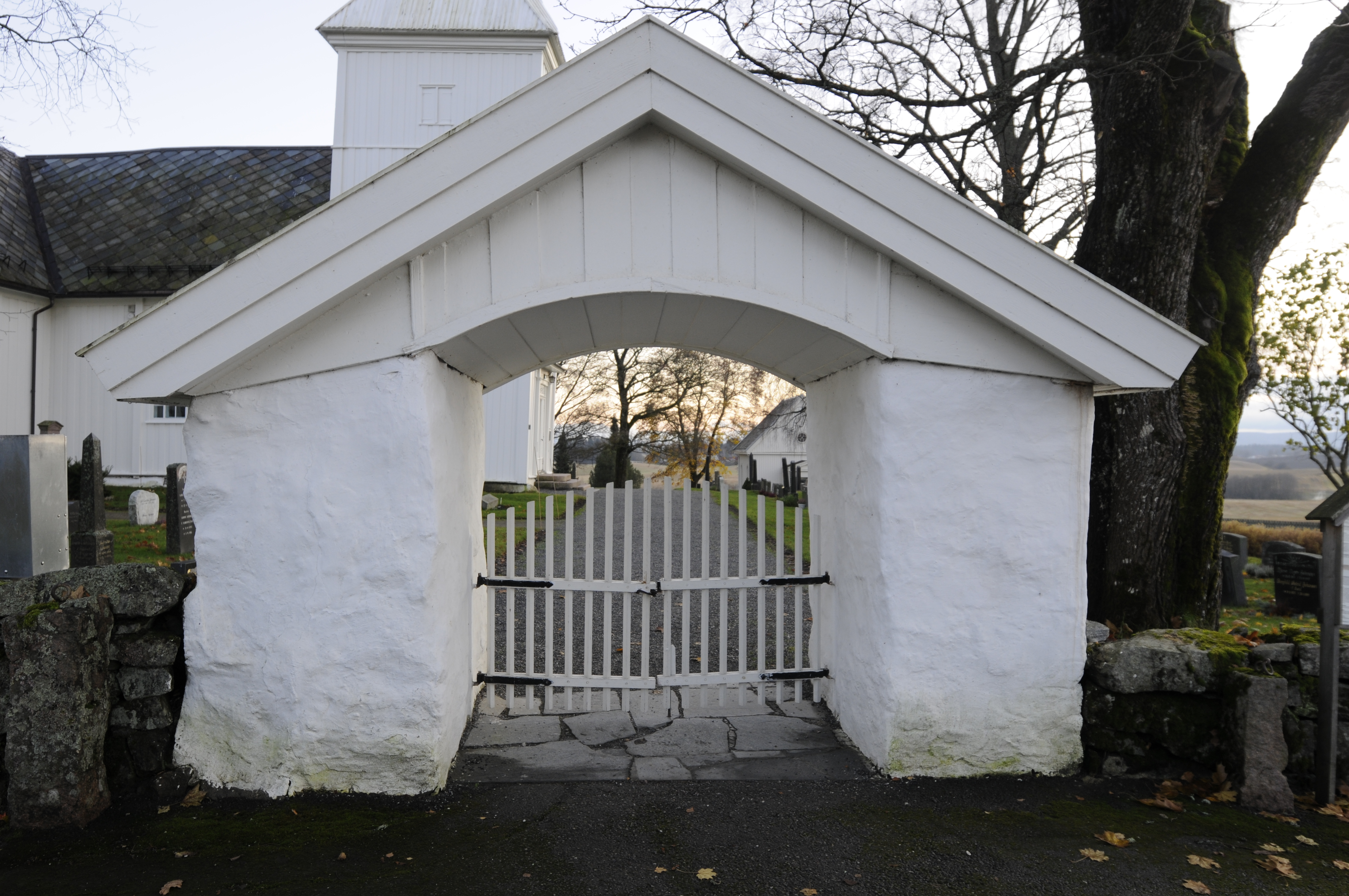 Hovin kirke i Ullensaker